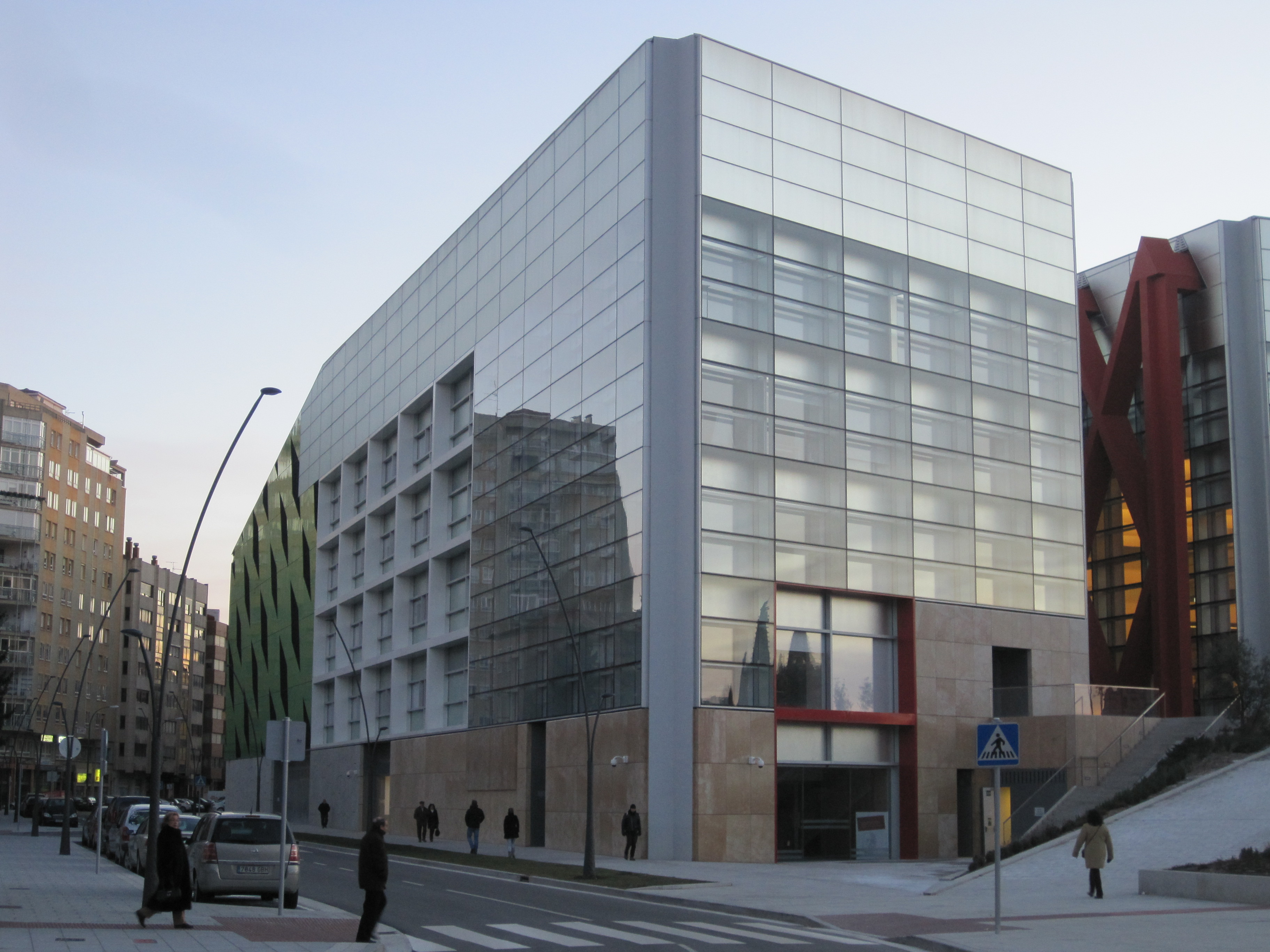 Vista externa del CENIEH (Centro Nacional de Investigación sobre la Evolución Humana) en Burgos.